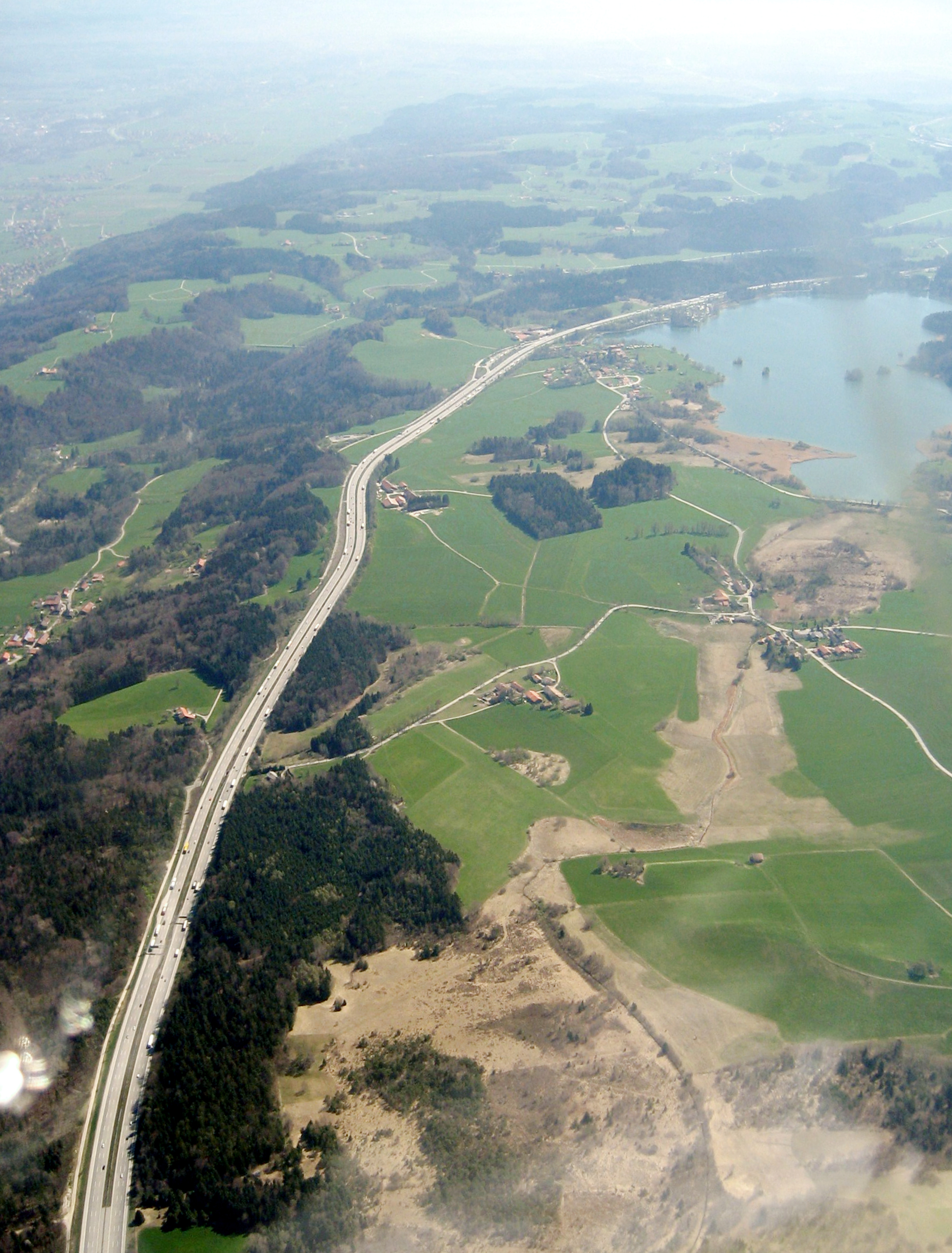 Autobahn A8 beim Seehamer See (Luftbild)